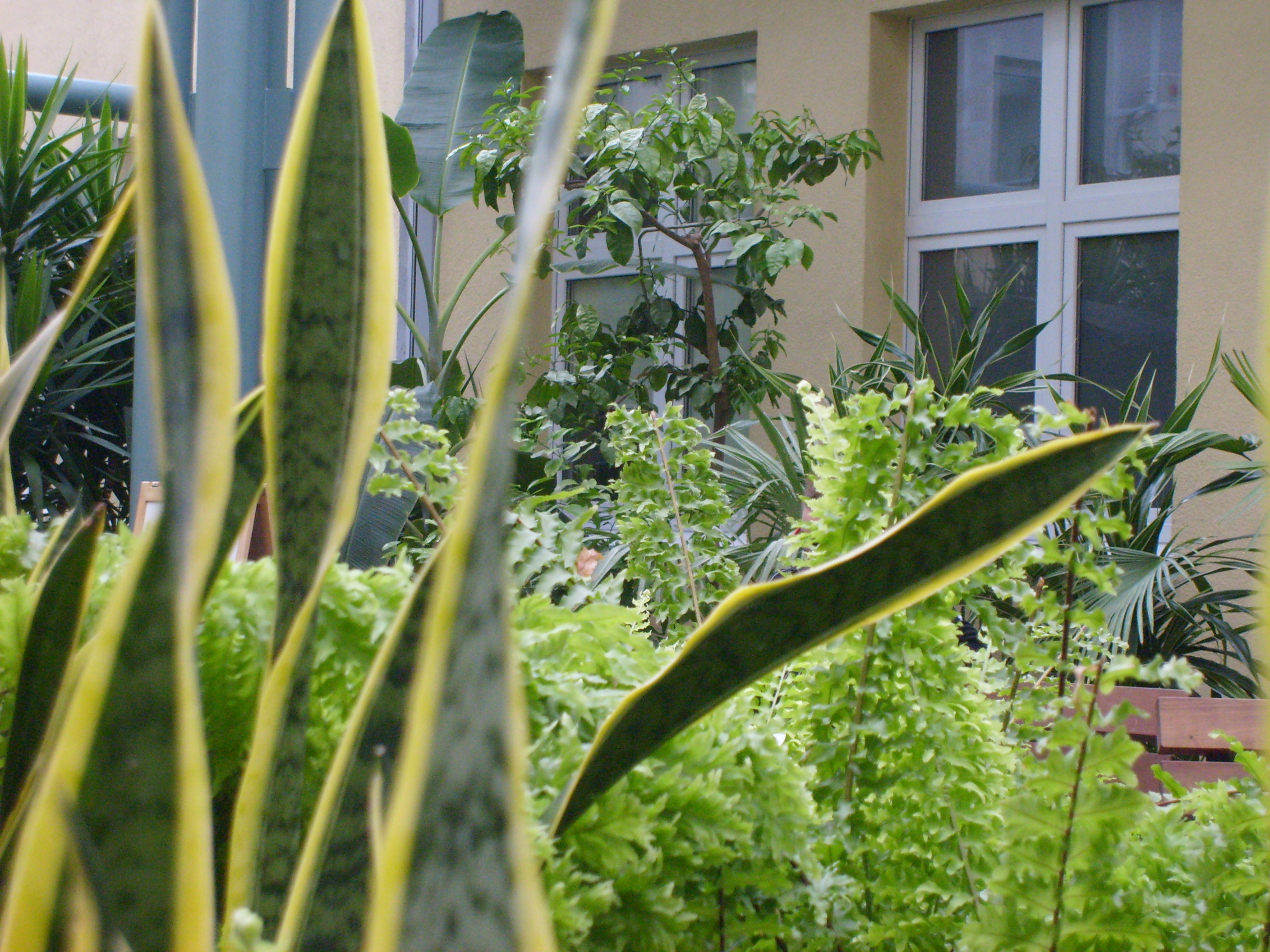 Ogród zimowy WCO - roślinność